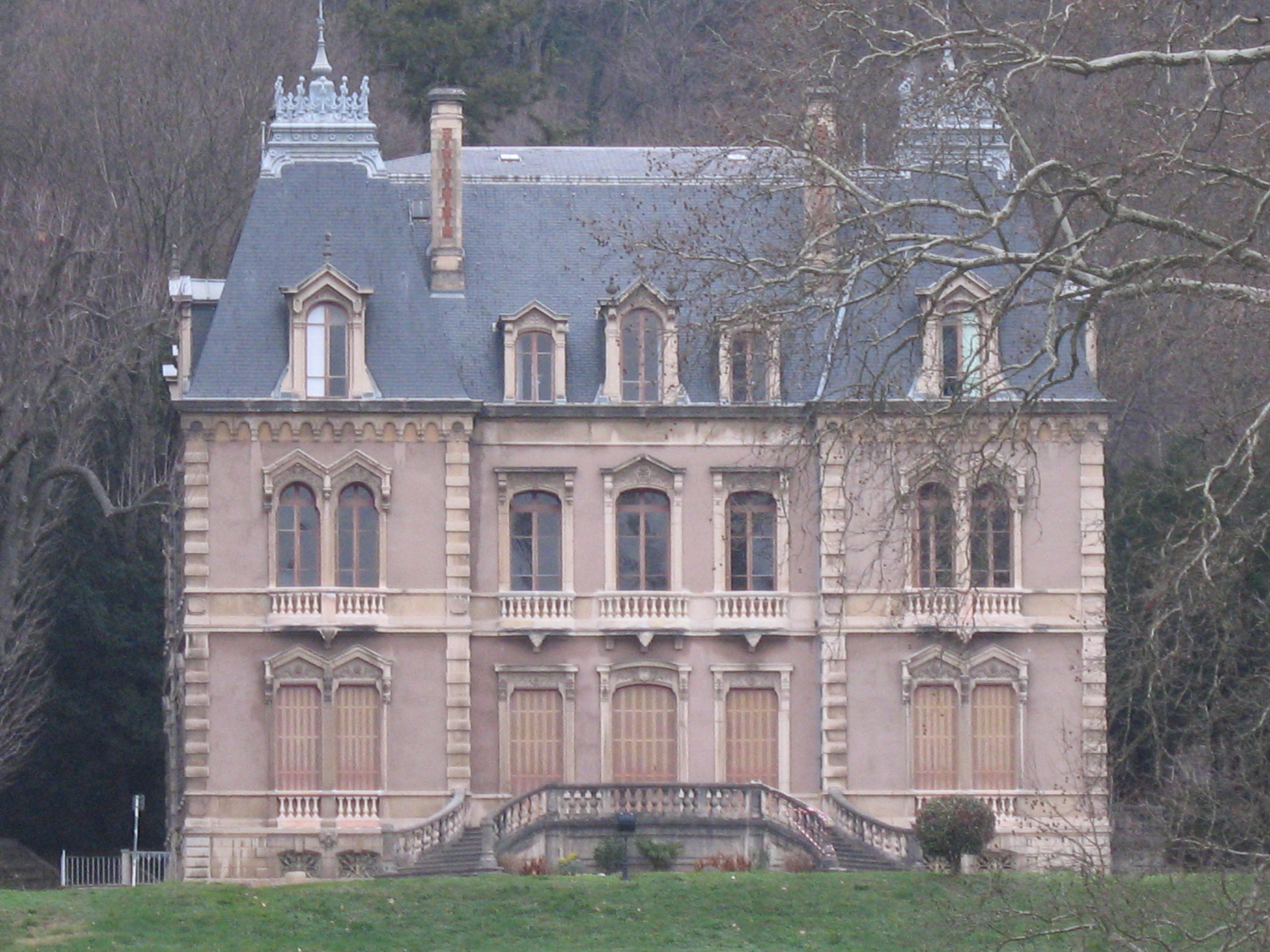 Château de la Bachasse à Sainte-Foy-lès-Lyon dans le Rhône.